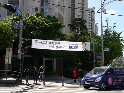 문재인 당선사례